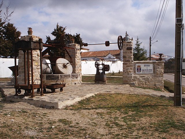 Casas de Don Antonio Entrada a la población Monumento al Molino. Imagen perteneciente a Antonio Cordero y donada para uso público. Categoría:España (imagen)